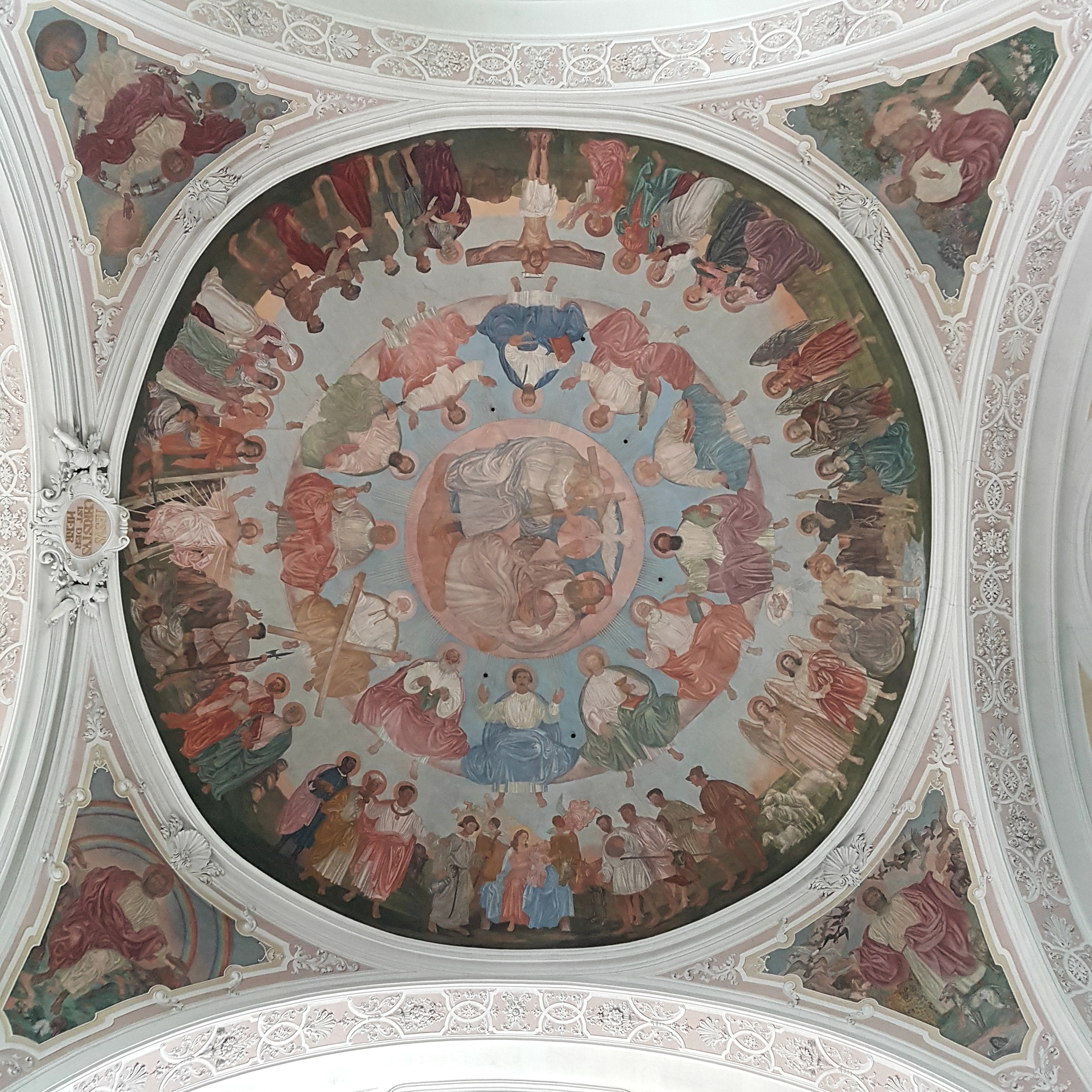 Klosterkirche Heilig Kreuz (Donauwörth), Gewölbe und Fresken im vorderen Bereich des Langhausgewölbes